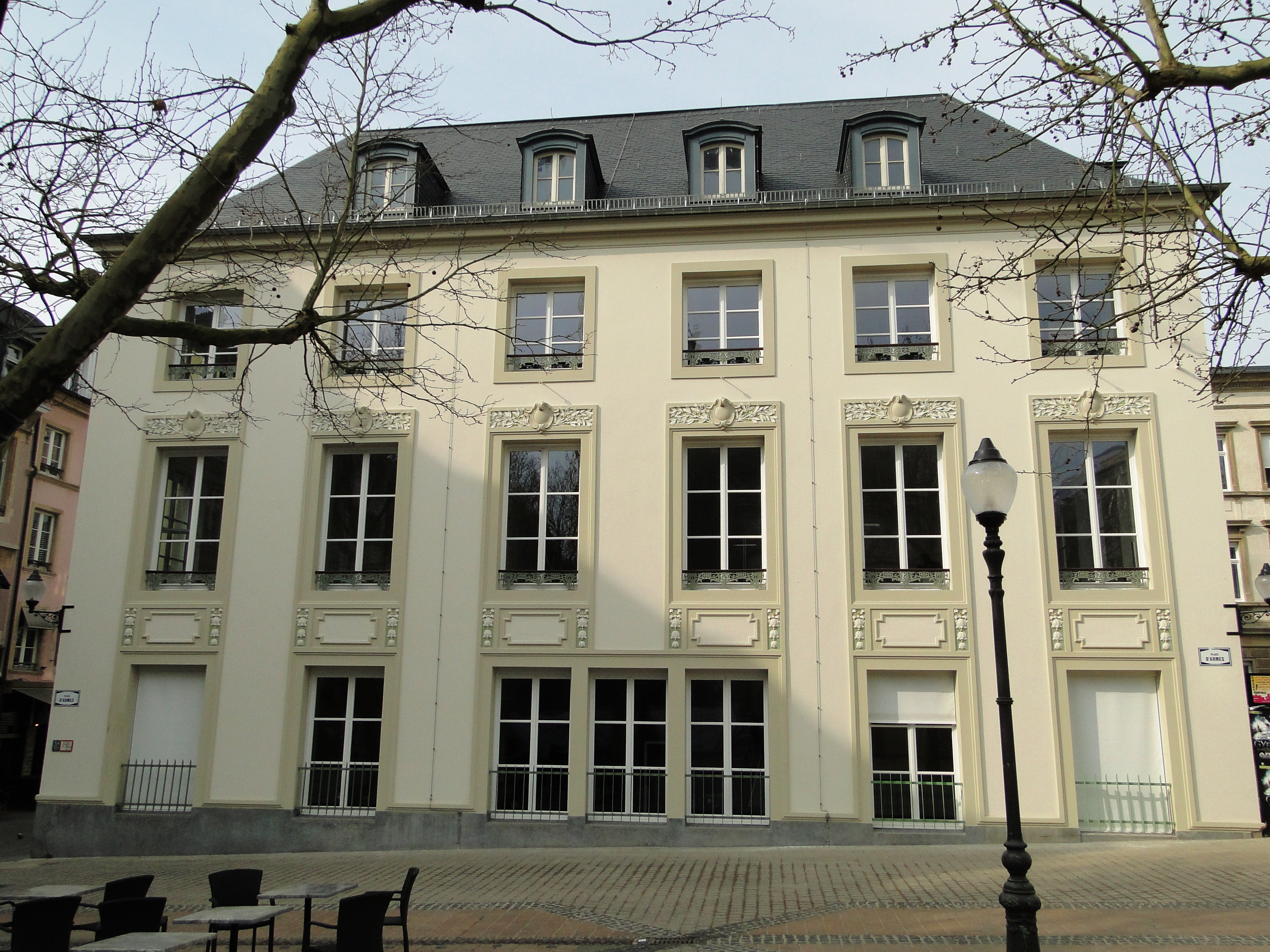 L'Hôtel de Gerden, après sa rénovation en mars 2015. Vue depuis la place d'Armes.